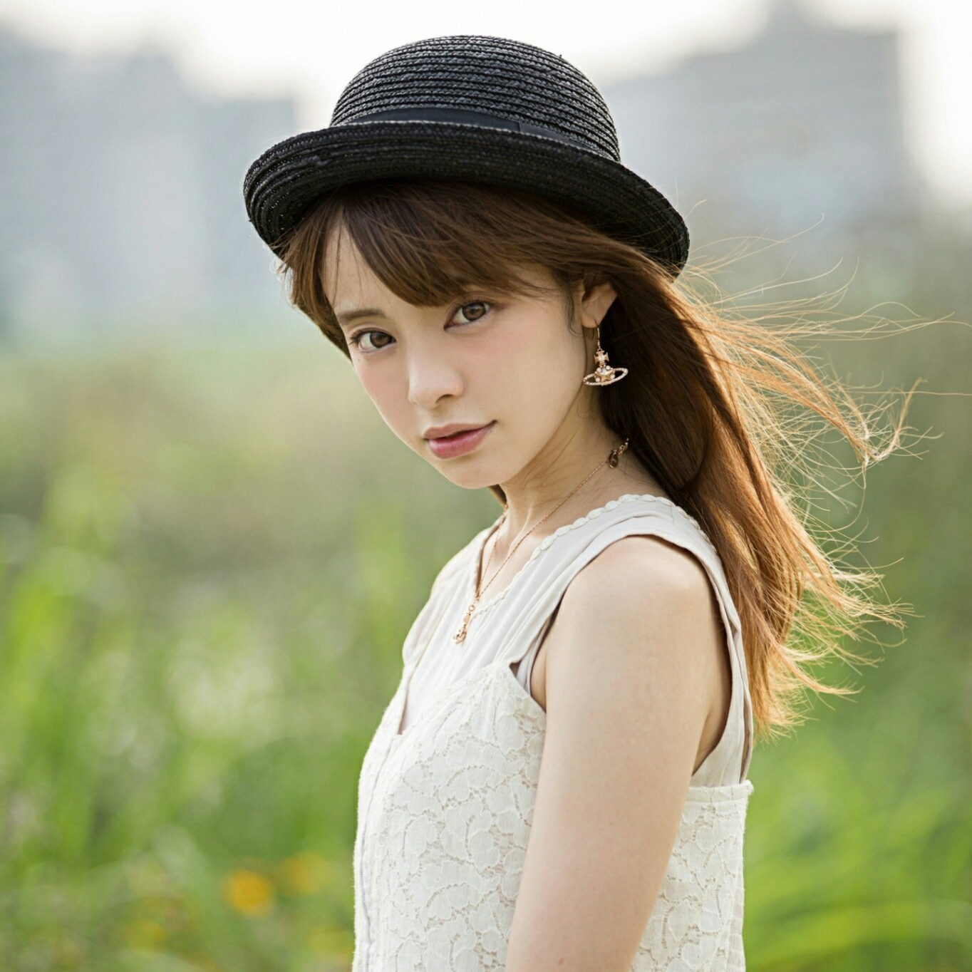 SHO-NO